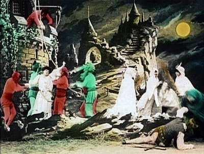 photo du film "Le royaume des fées" (1903, Méliès)